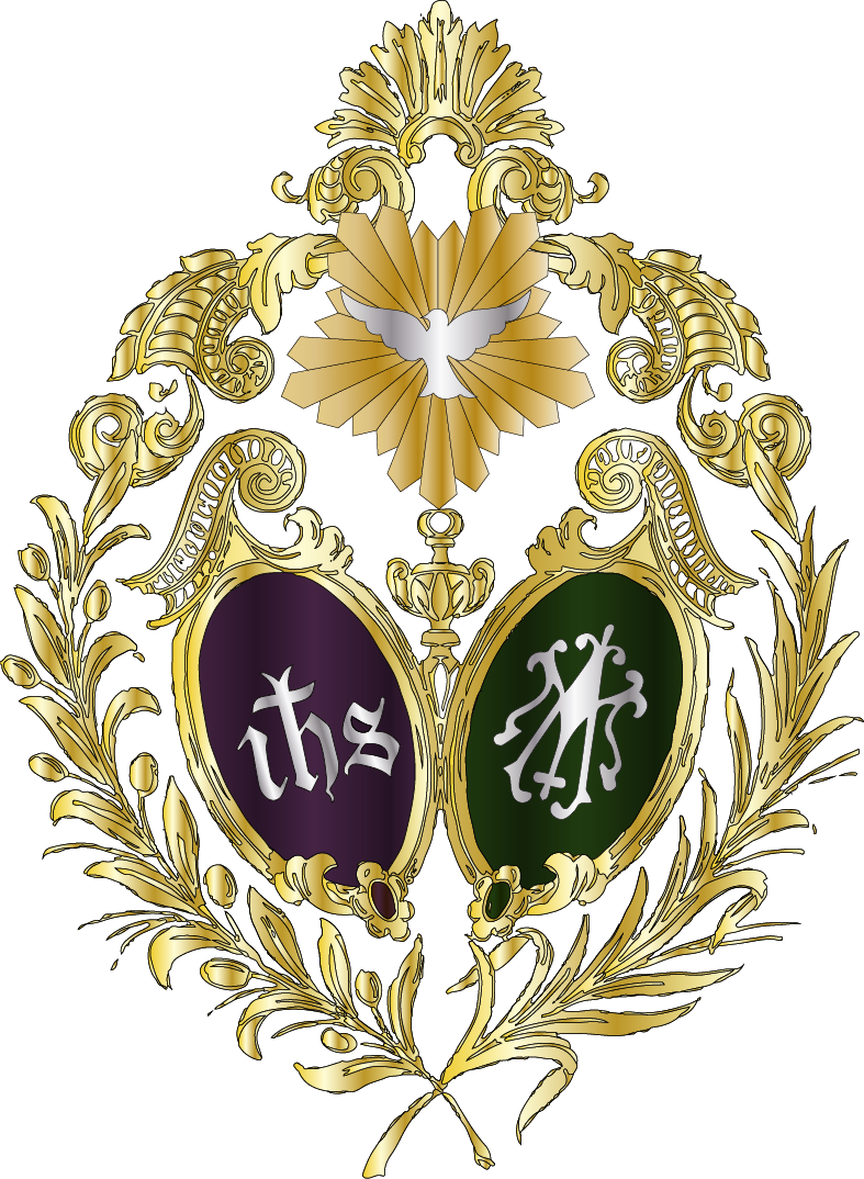 Heráldica Agrupapación Parroquial Cautivo, Par y Rocio de Elche